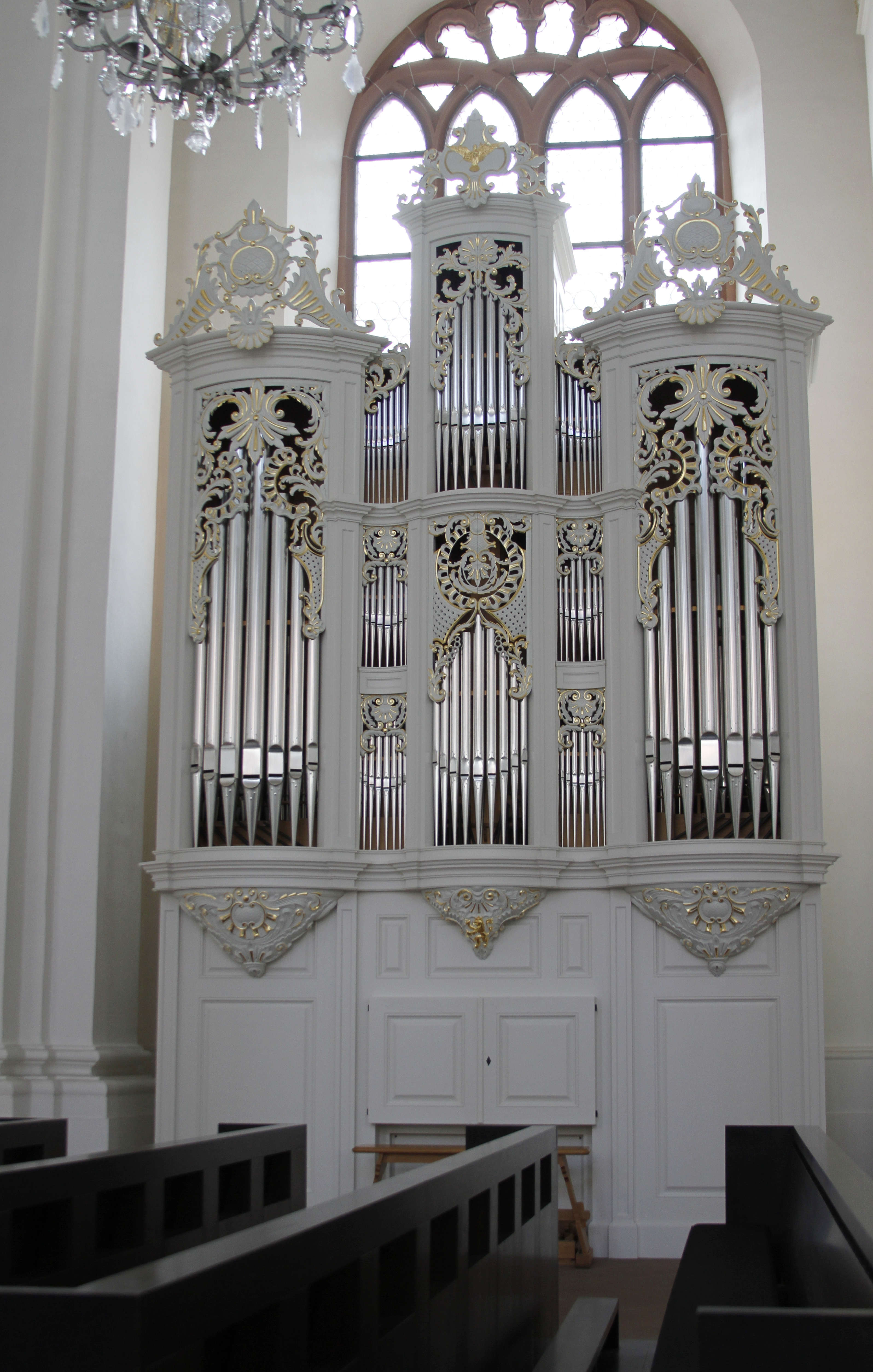 Jesuitenkirche - Heidelberg - Germany